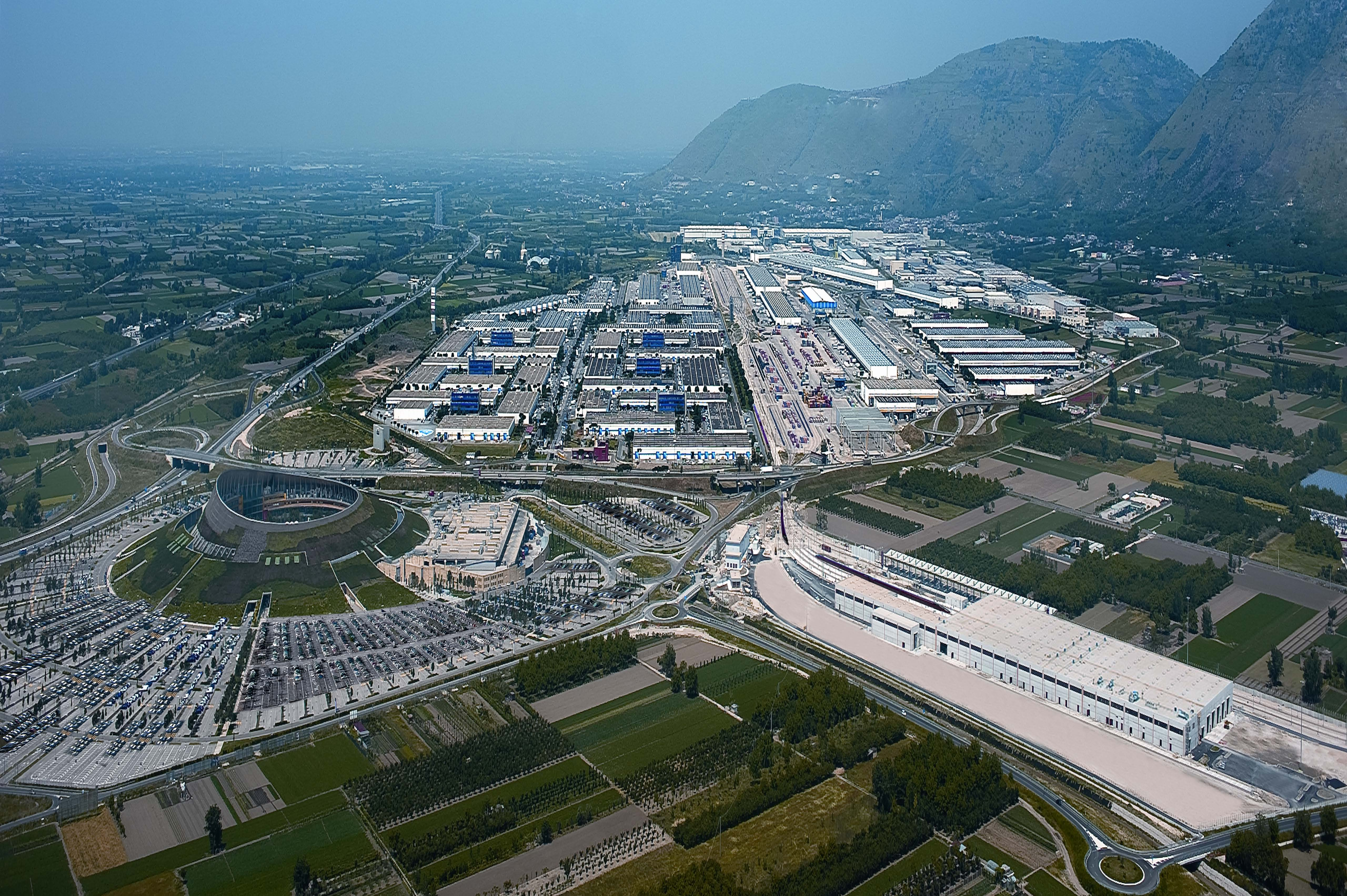 Il Distretto CIS - Interporto Campano - Vulcano Buono